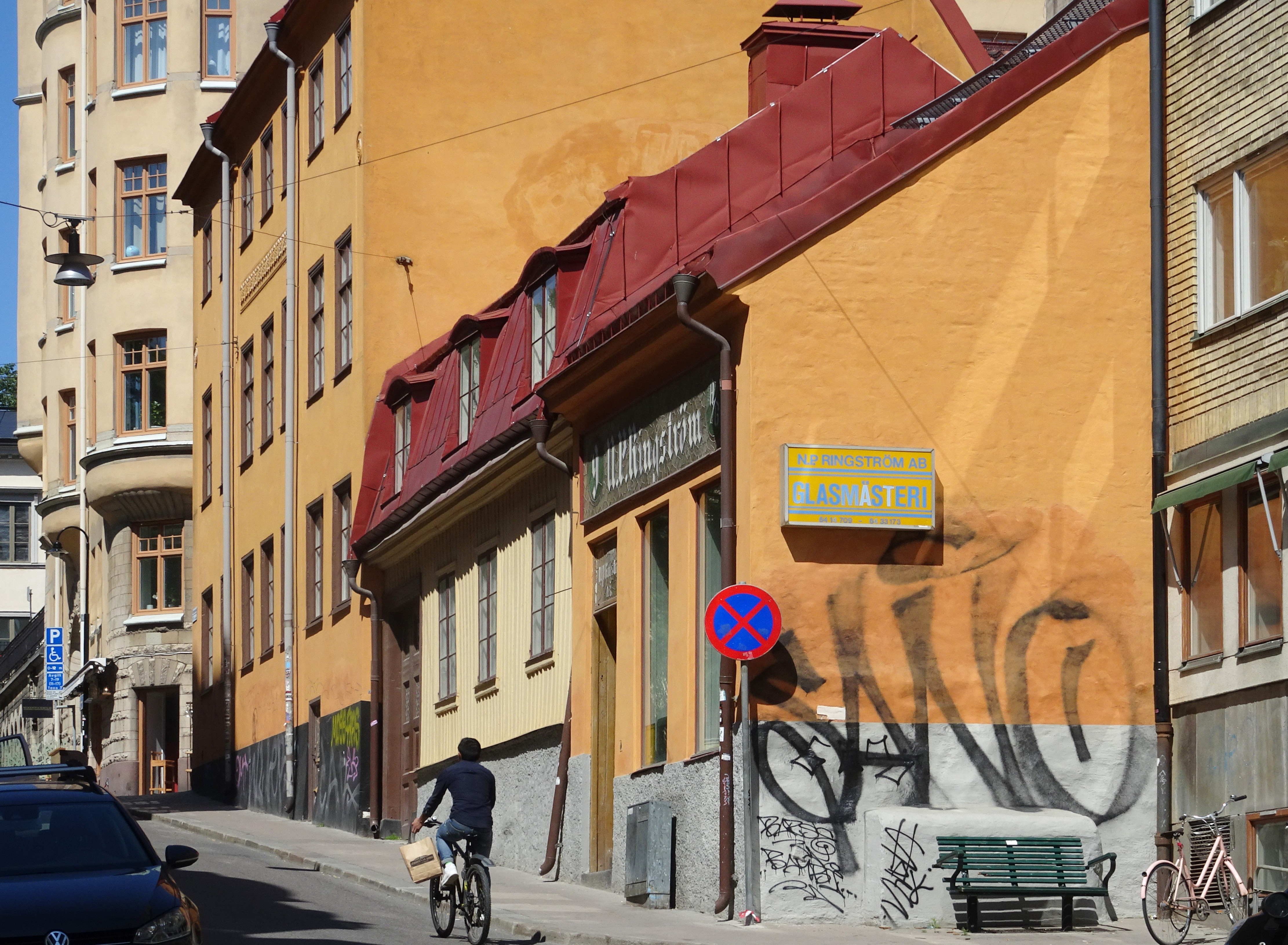 Fastigheten Häckelfjäll 2 (närmast) och 3 vid Östgötagatan